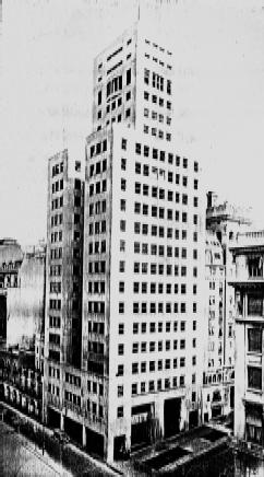 Edificio Comega, ubicado en la esquina sudoeste del cruce de las avenidas Corrientes y Leandro N. Alem, en Buenos Aires, Argentina, poco después de su inauguración.